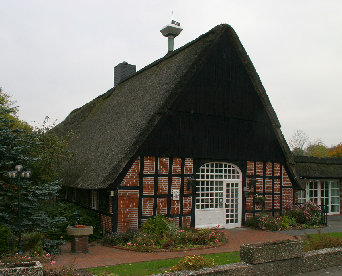 Reetdachkate von 1819 in Boostedt, heute als Restaurant genutzt